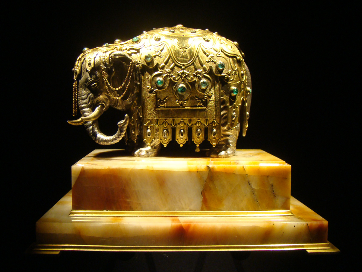 Hist. Exponat, Schlossmuseum Gotha, Schloss Friedenstein Elefant, aus der Werkstatt von Johann Melchior Dinglinger, Dresden, um 1710/20, seit 1728 in der Kunstkammer Gotha nachweisbar.